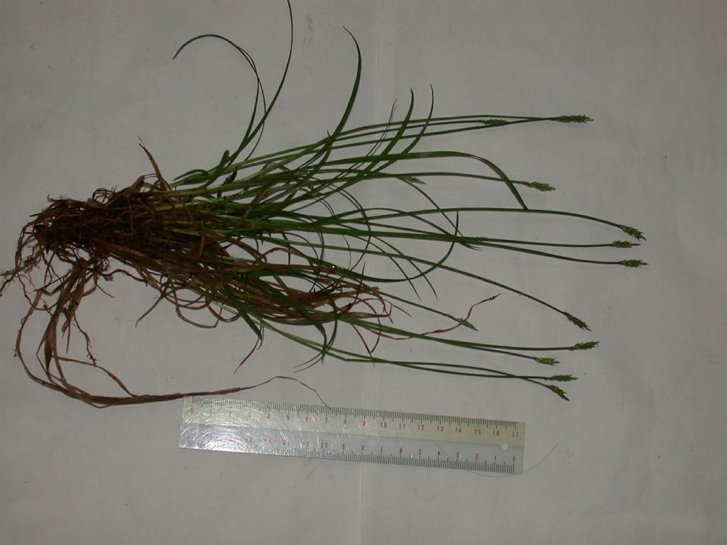 Carex rhizopoda (Cyperaceae) シラコスゲ ２００４年５月８日和歌山県田辺市